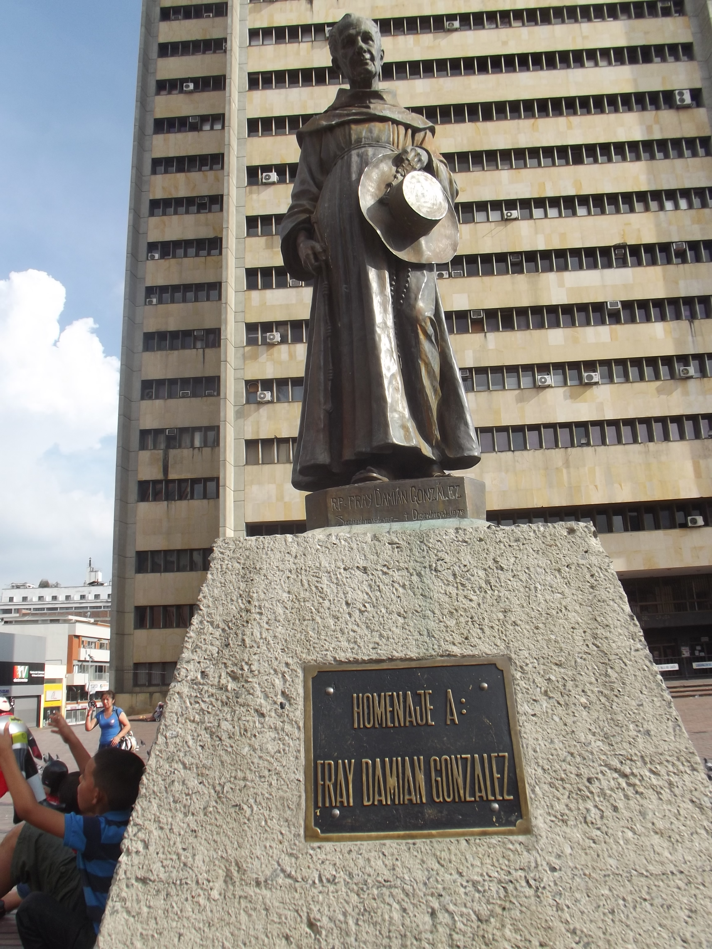 Iglesia de San Francisco